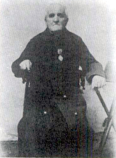 Padre Augusto Finotti